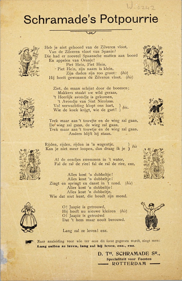 Liedblad, gedrukt door D. Th. Schramade sr., ca. begin 19e eeuw, met verschillende liedjes, incl. afbeeldingen.